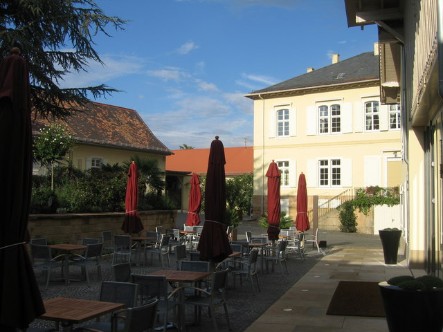 Restaurant terrace - Deideshein